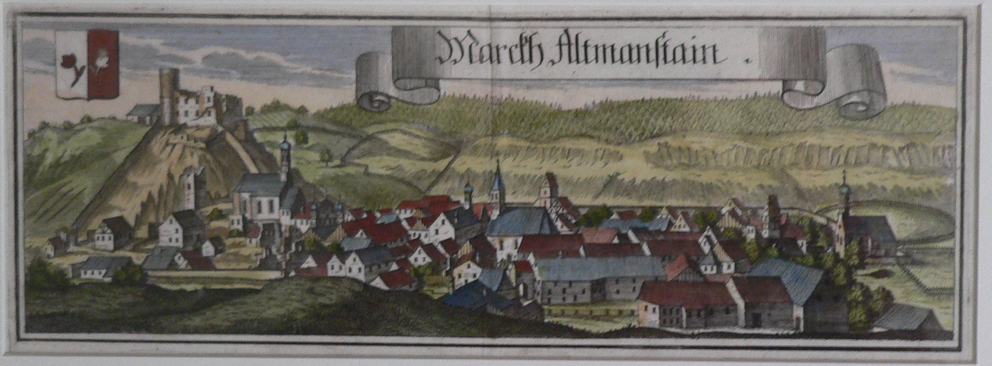 "Marcth Altmannstain" (Markt Altmannstein), Kupferstich von Michael Wening